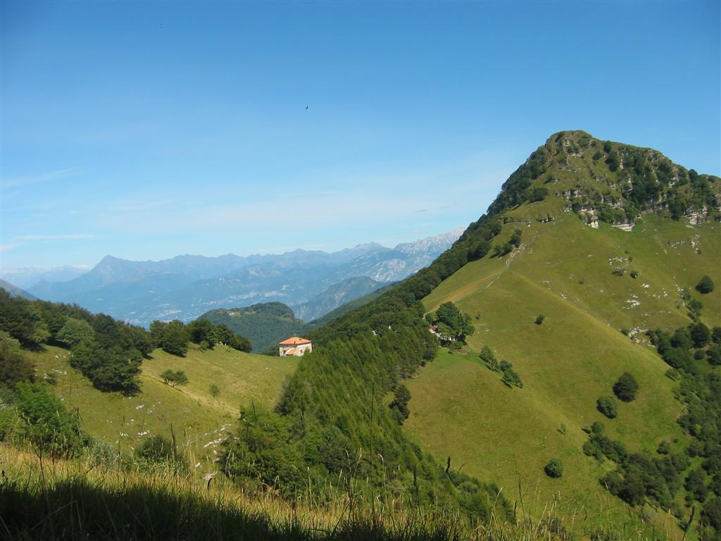 Mte Bisbino sasso Gordona